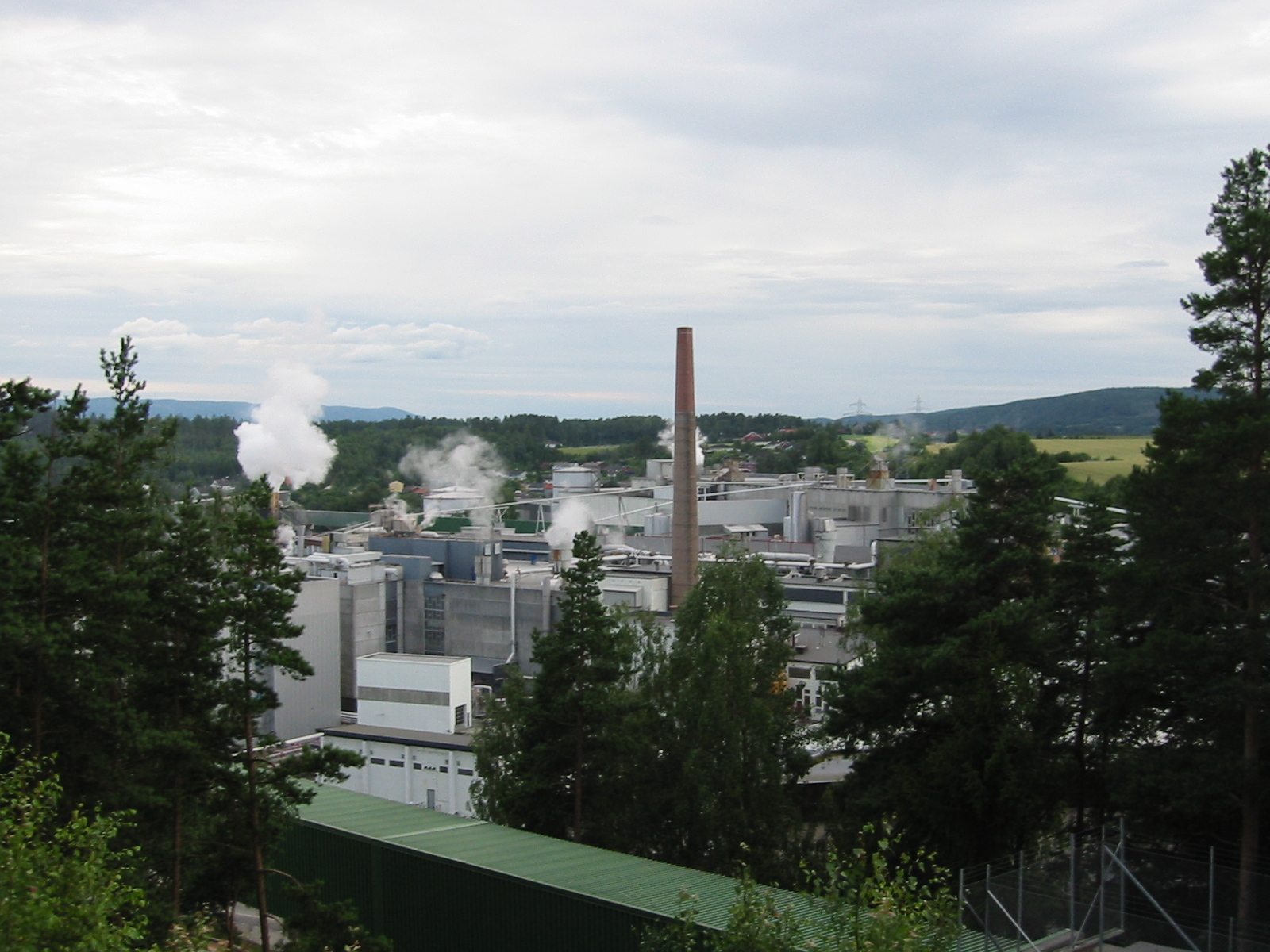 Norske skog Follum, Hønefoss, Norway